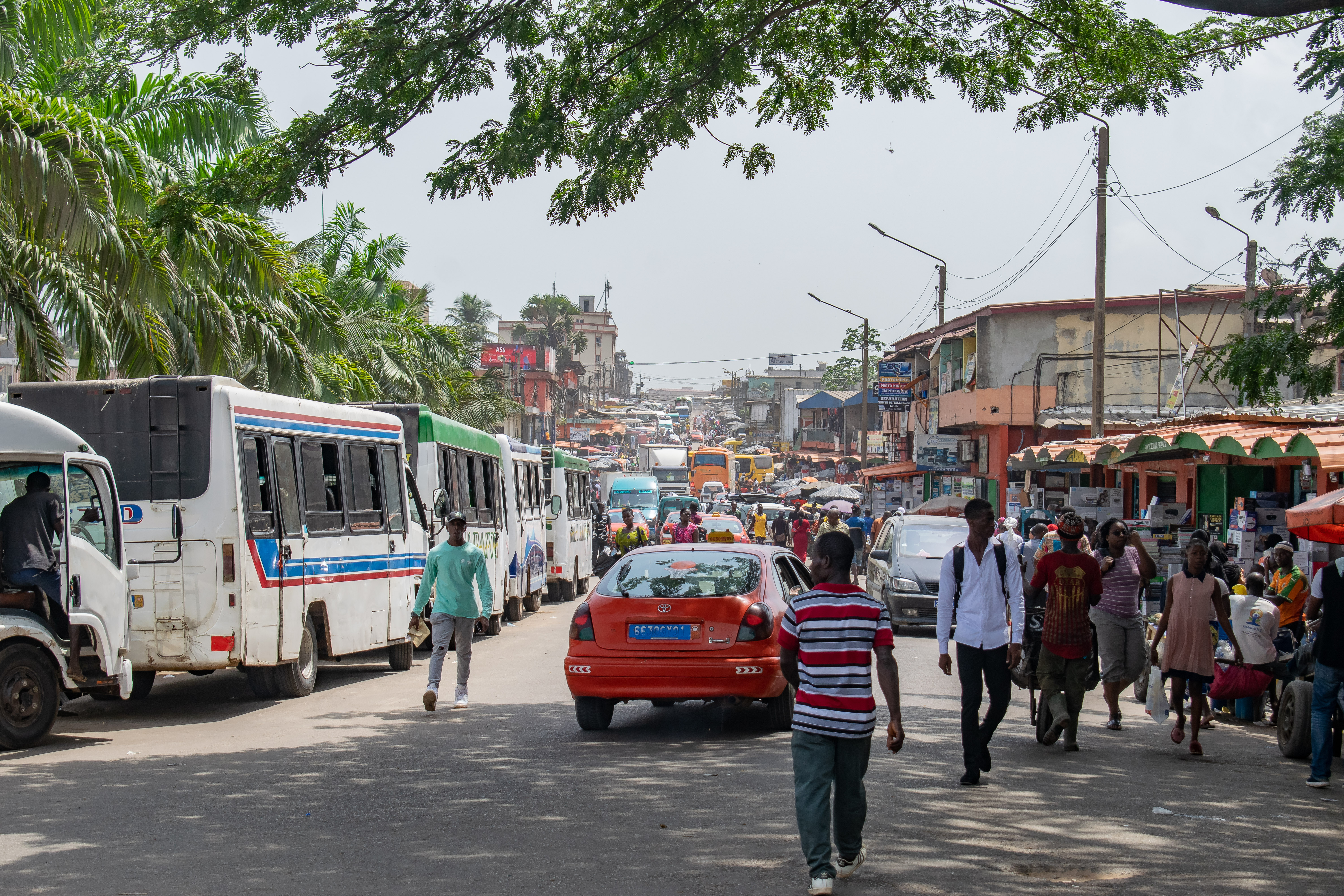 concentration de véhicules et de populations dans une de la commune d'Adjamé, Abidjan, Côte d'Ivoire This is an image with the theme "Africa on the Move or Transport" from: Ivory Coast